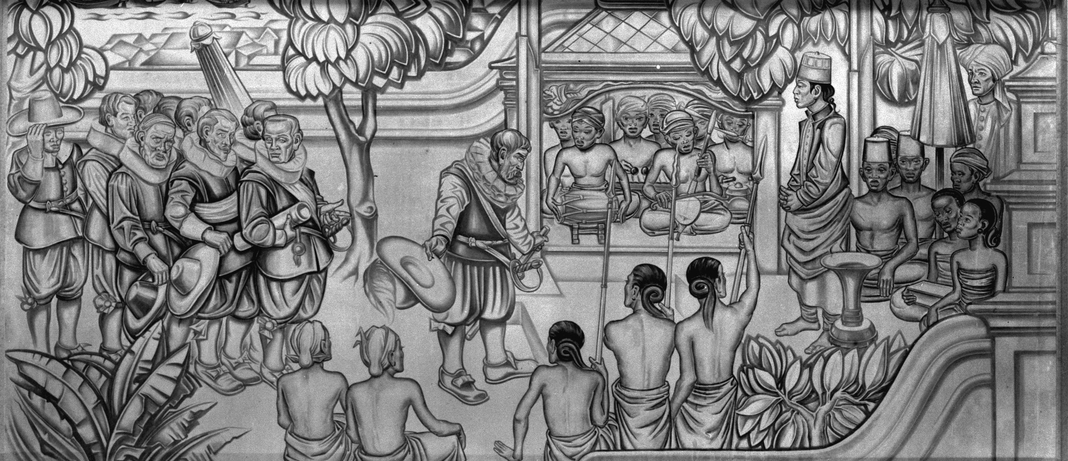 foto. Wandschildering 'La réception de Cornelis de Houtman à Java en 1595' door Paulides in het Nederlandse paviljoen op de Koloniale Wereldtentoonstelling in Parijs